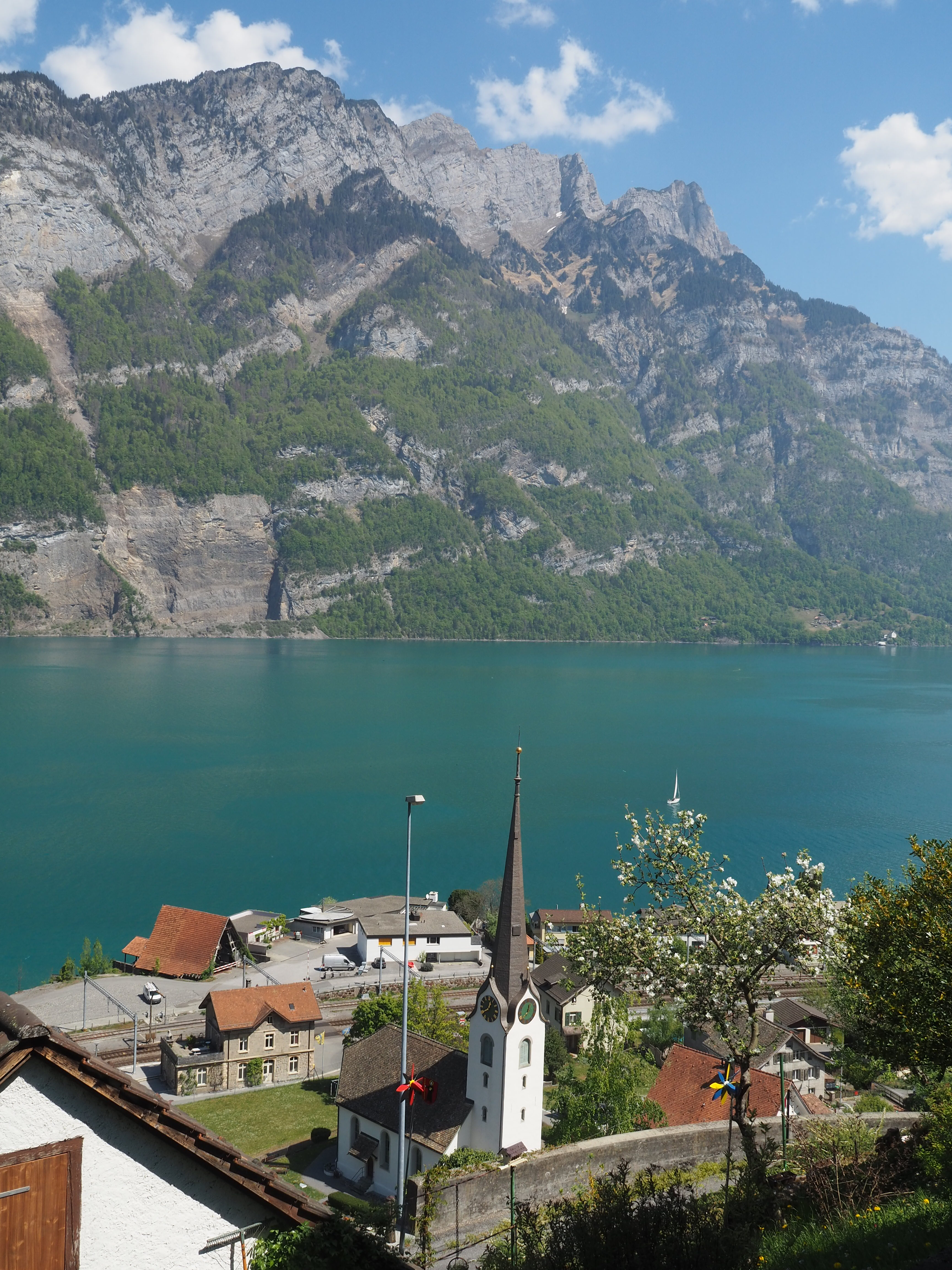 Mühlehorn am Walensee im Glarnerland, Schweiz